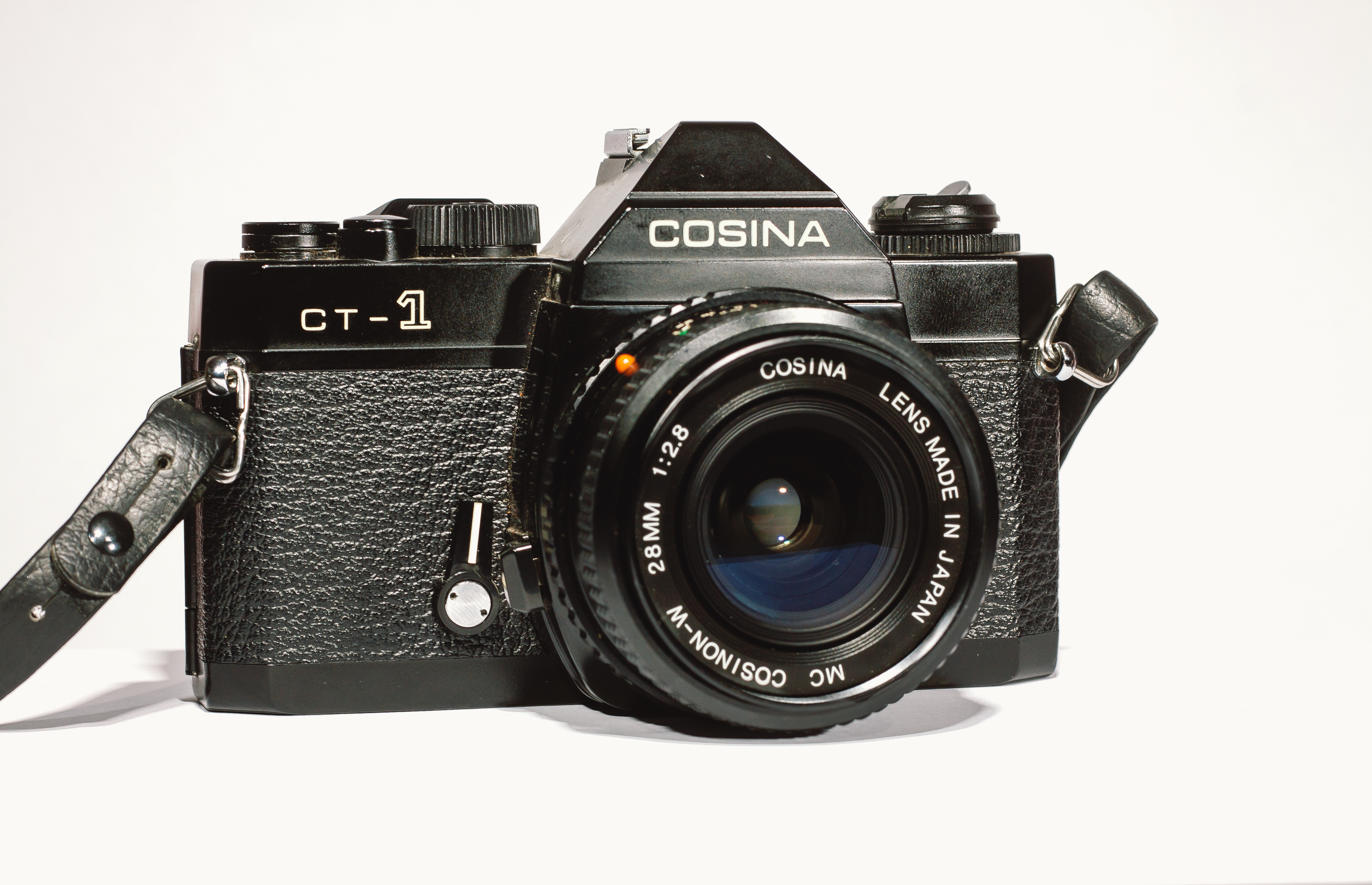 Cosina CT-1